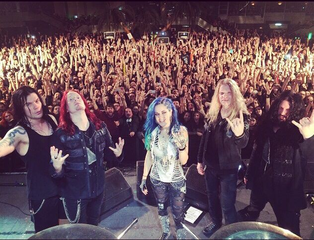 Arch Enemy in Barcelona, Spain